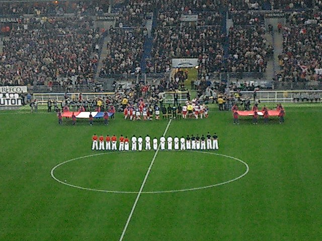 Il s'agit d'une photo prise personnellement au Stade de France, je pensais la mettre sur la page des confrontations entre France-Suisse pour l'illustrer, en espèrant que celle-ci sera accepté; Amicalement Chaps the idol 6 janvier 2006 Ã 13:12 (CET)